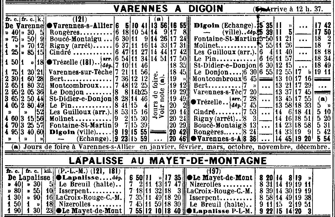 Extrait du Livret Chaix de Mai 1914 (4ème partie : PLM (compagnies diverses), page 182 : lignes Varennes à Digoin et Lapalisse au Mayet-de-Montagne